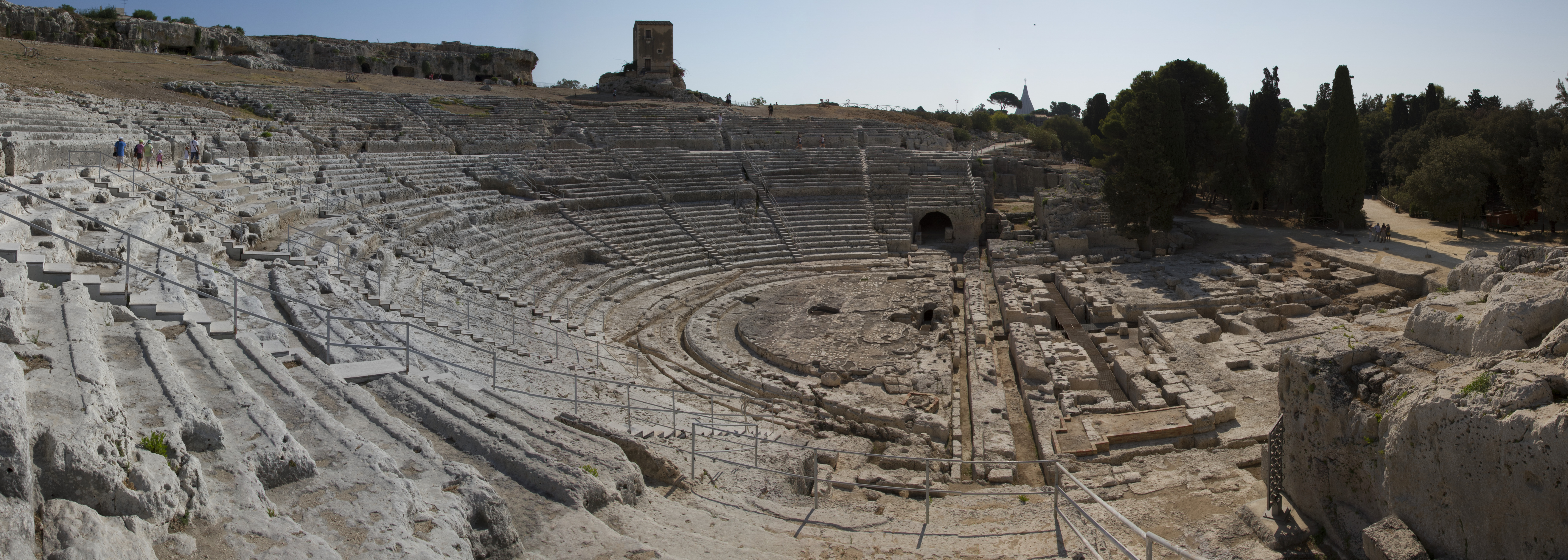 Teatro griego de Siracusa